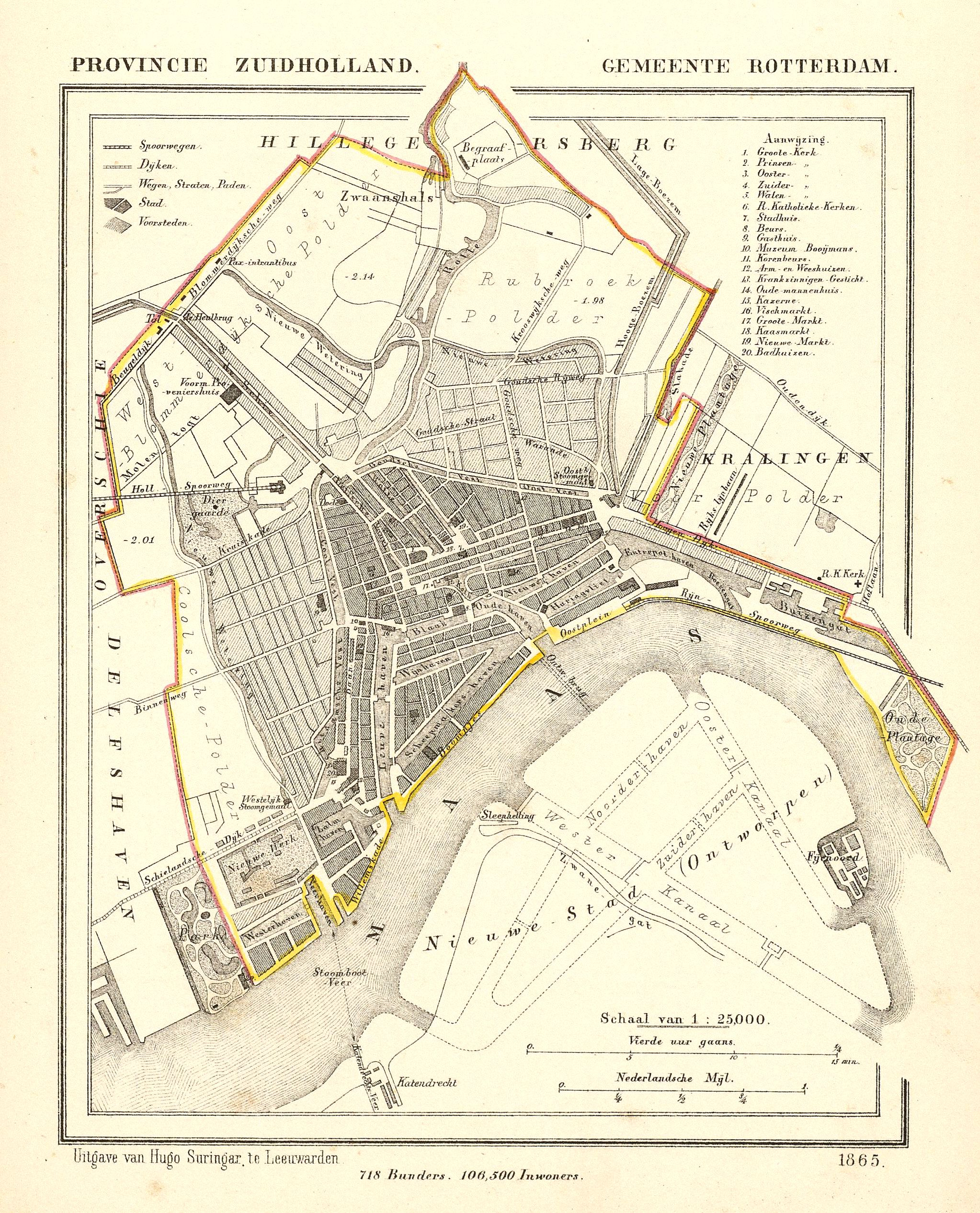 Rotterdam, Gemeente-Atlas van Nederland, 1865